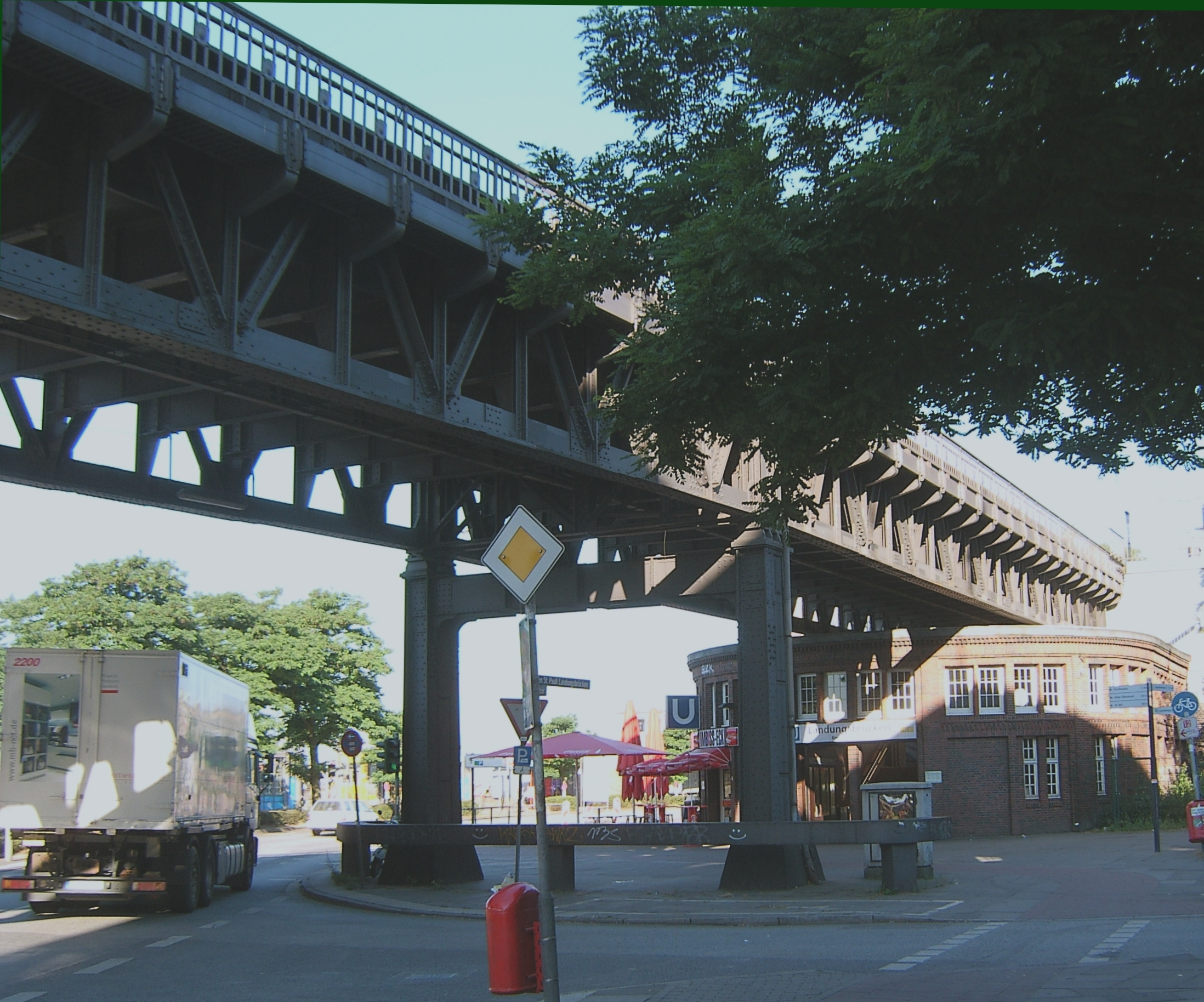 Eingang Hafentor der Hochbahnhaltestelle Landungsbrücken in der Hamburger Neustadt.